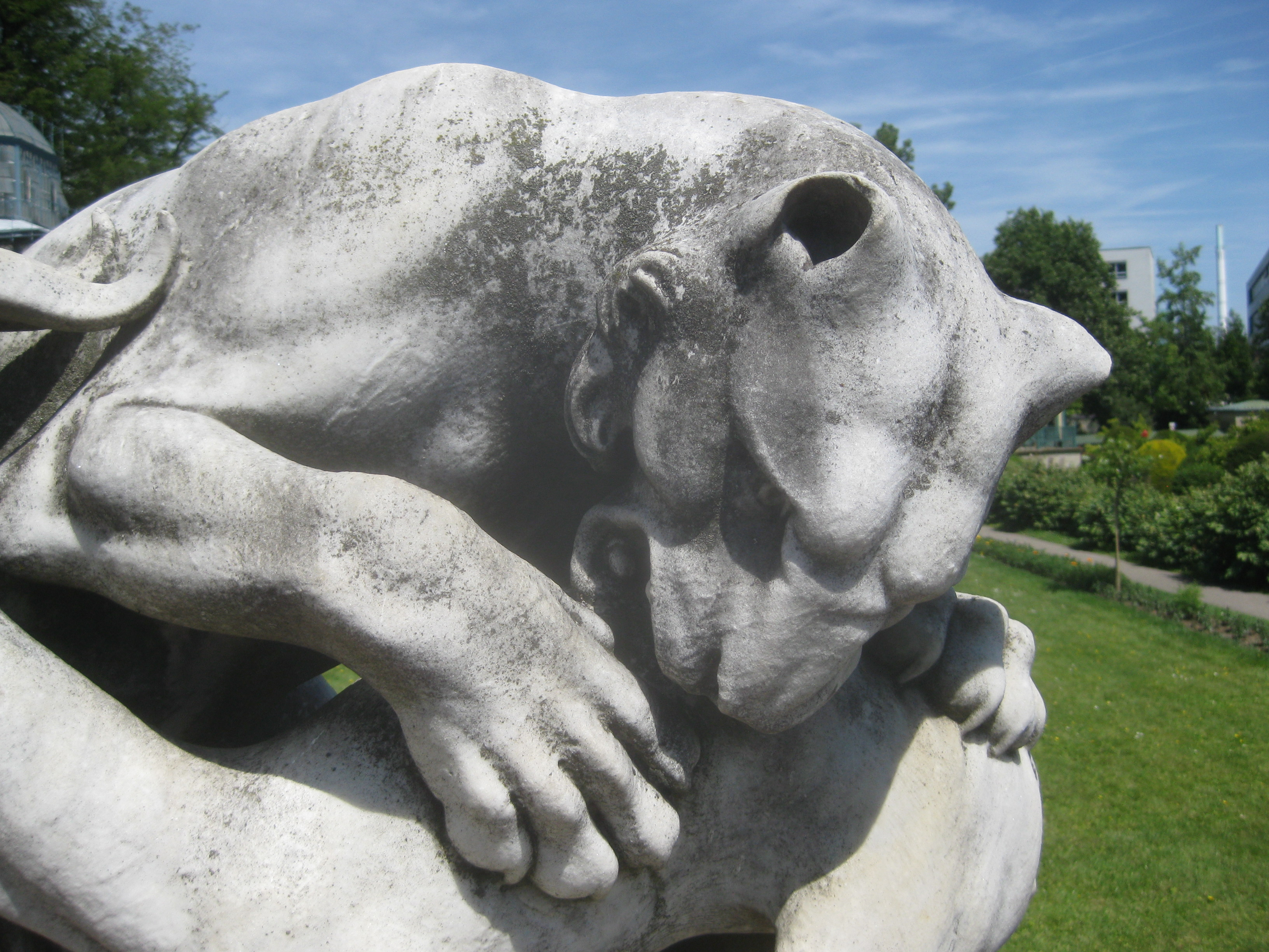 Albert Güldenstein: Panther, einer Gazelle auf den Rücken springend, Marmor, Entstehungsjahr 1848, bezeichnet: „A. Güldenstein. Rom. 1848.“, Stuttgart, Wilhelma, rechts vor dem Hauptportal des Maurischen Landhauses.